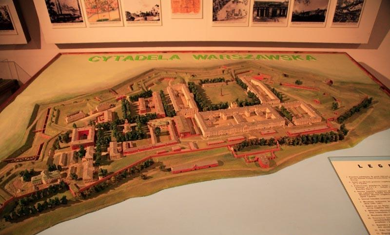 Warszawa (Polska)